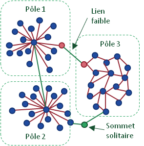 Topologie d'un réseau décentralisé